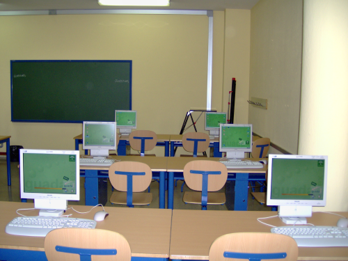 Aula TIC 2006/2007